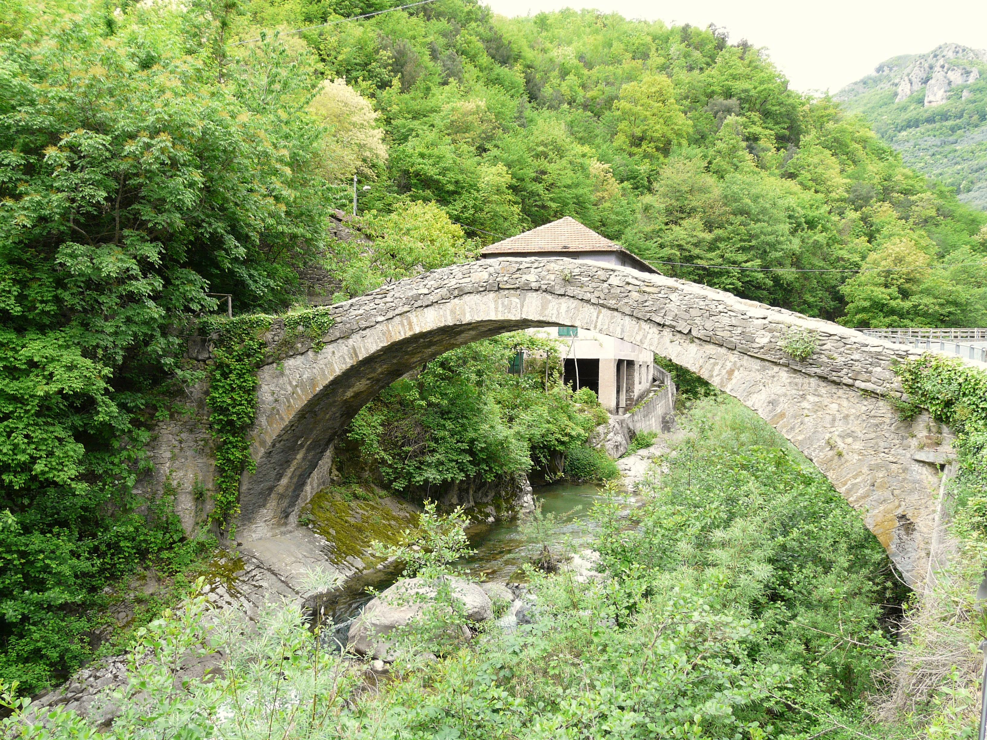 Ponte presso Nasino, Liguria, Italia